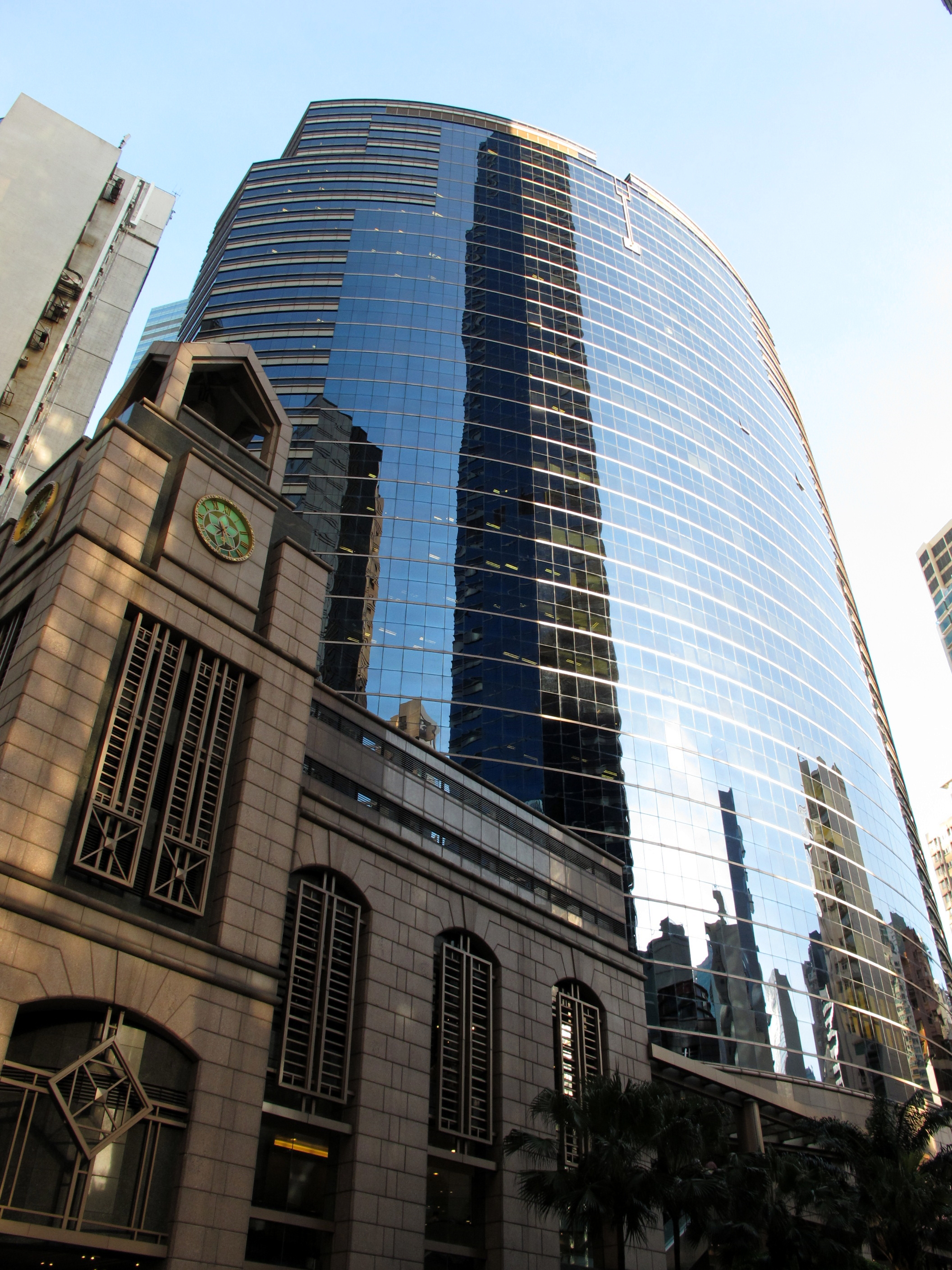 Millennium Plaza, Sheung Wan